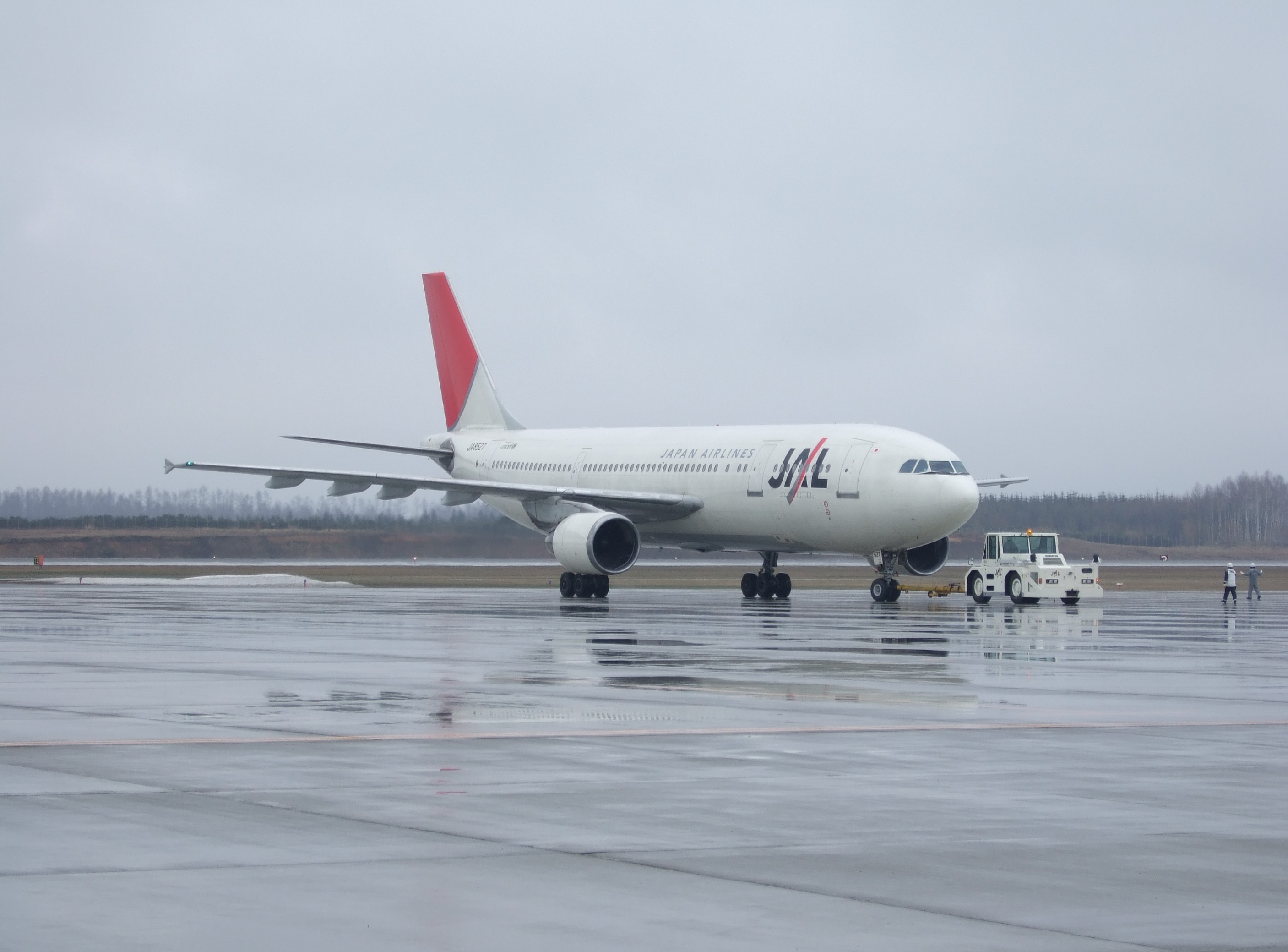 A300-600/600R. 200604 Obihiro Japan.